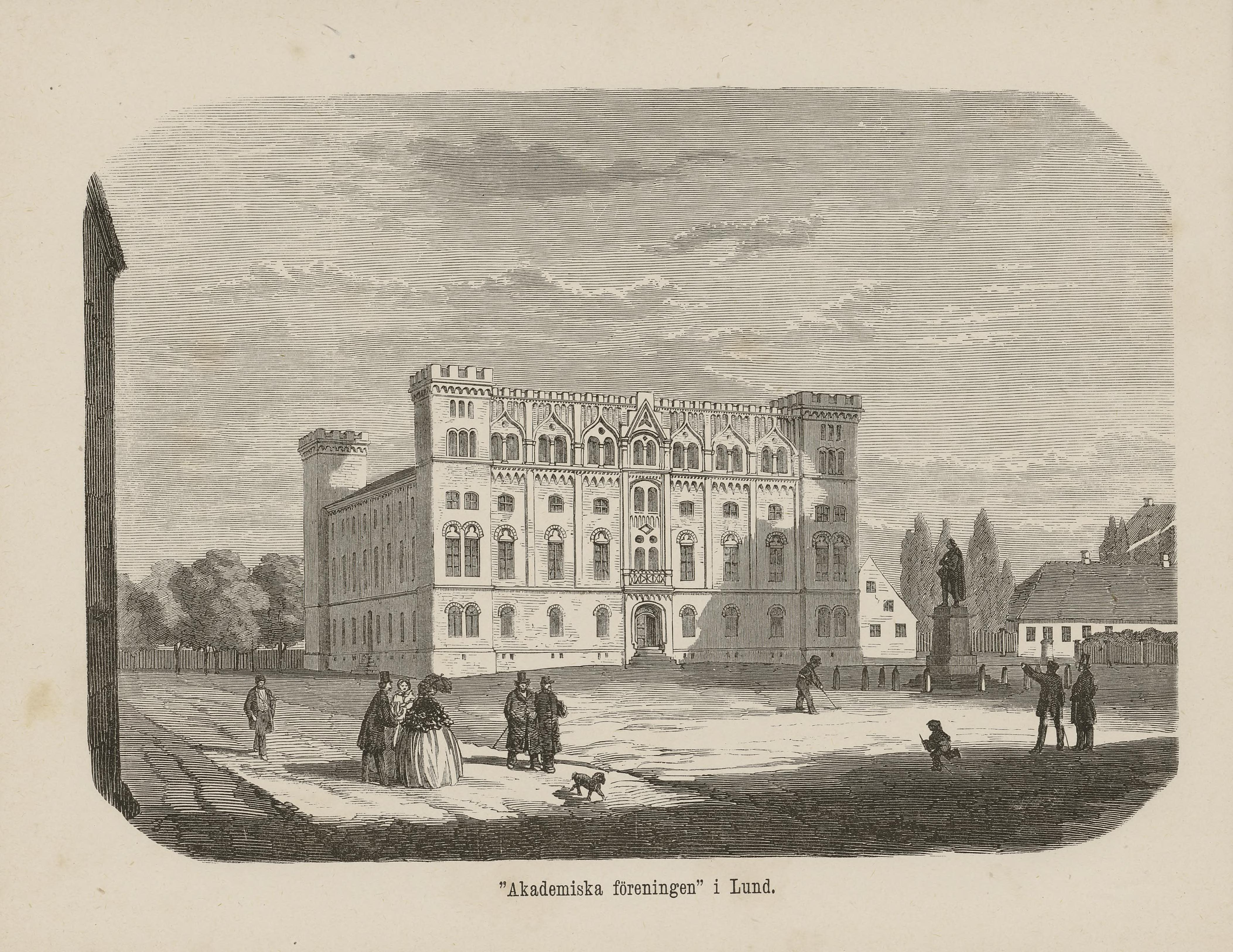 Illustrasjon hentet fra boken Nordiska taflor av ukjent forfatter og utgitt av Albert Bonnier (se, 1865)